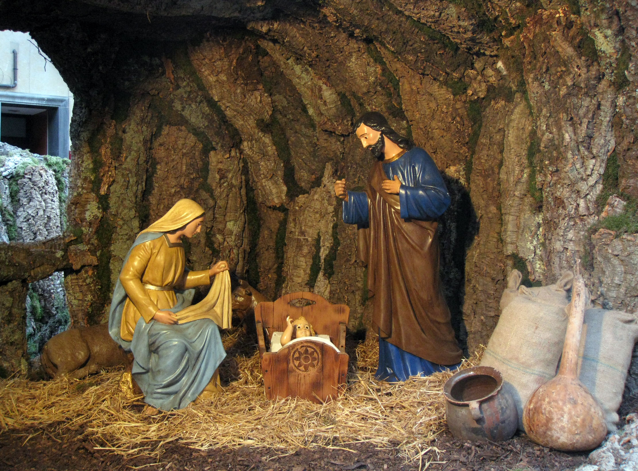 Pessebre al Raval de Montserrat, davant l'Ajuntament de Terrassa, Nadal del 2011.